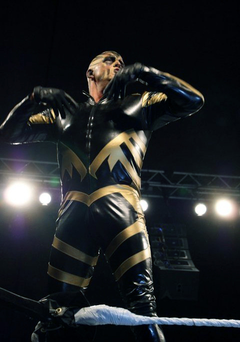 WWE's Goldust